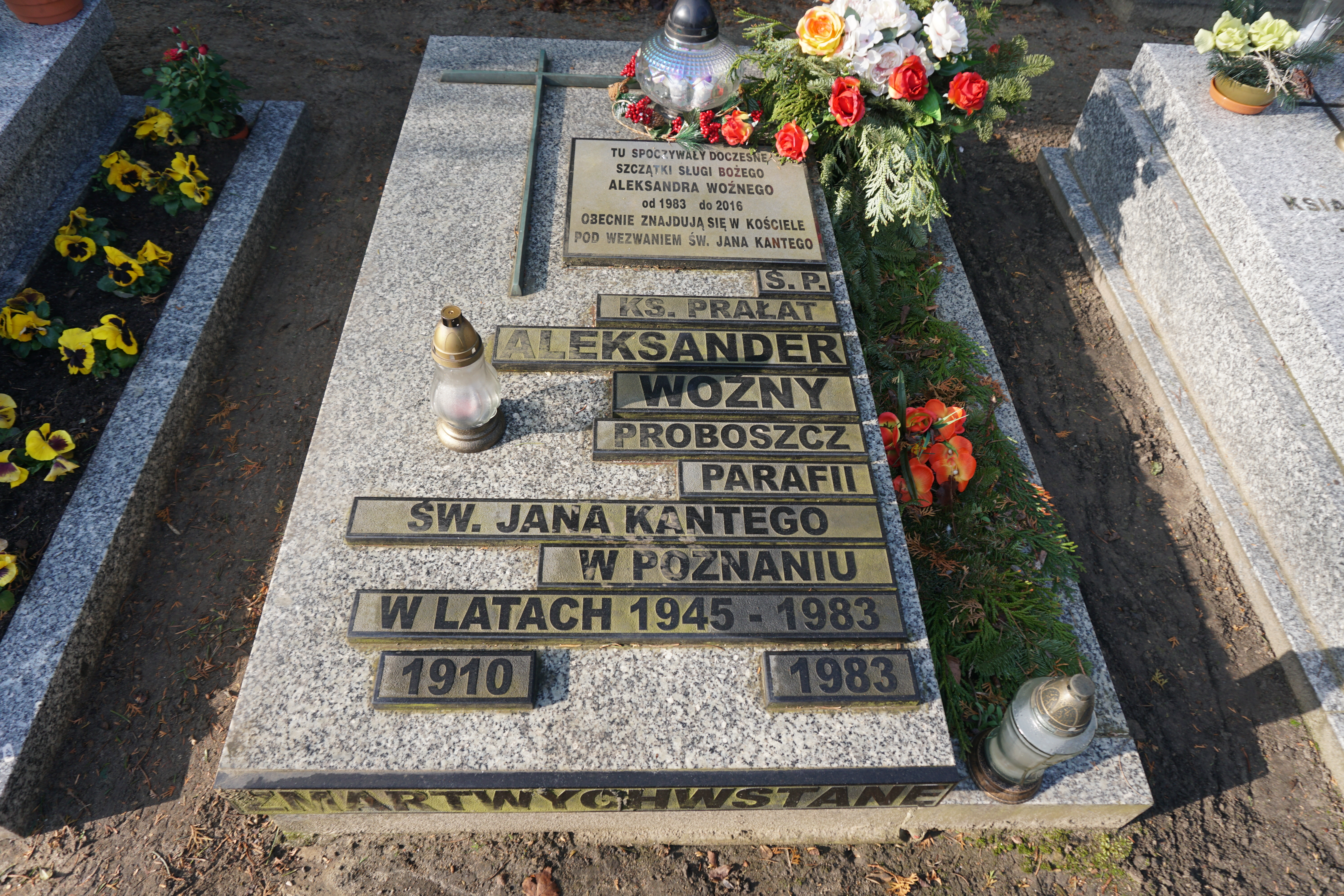 Pierwotny grób ks. Aleksandra Woźnego na Cmentarzu Górczyńskim